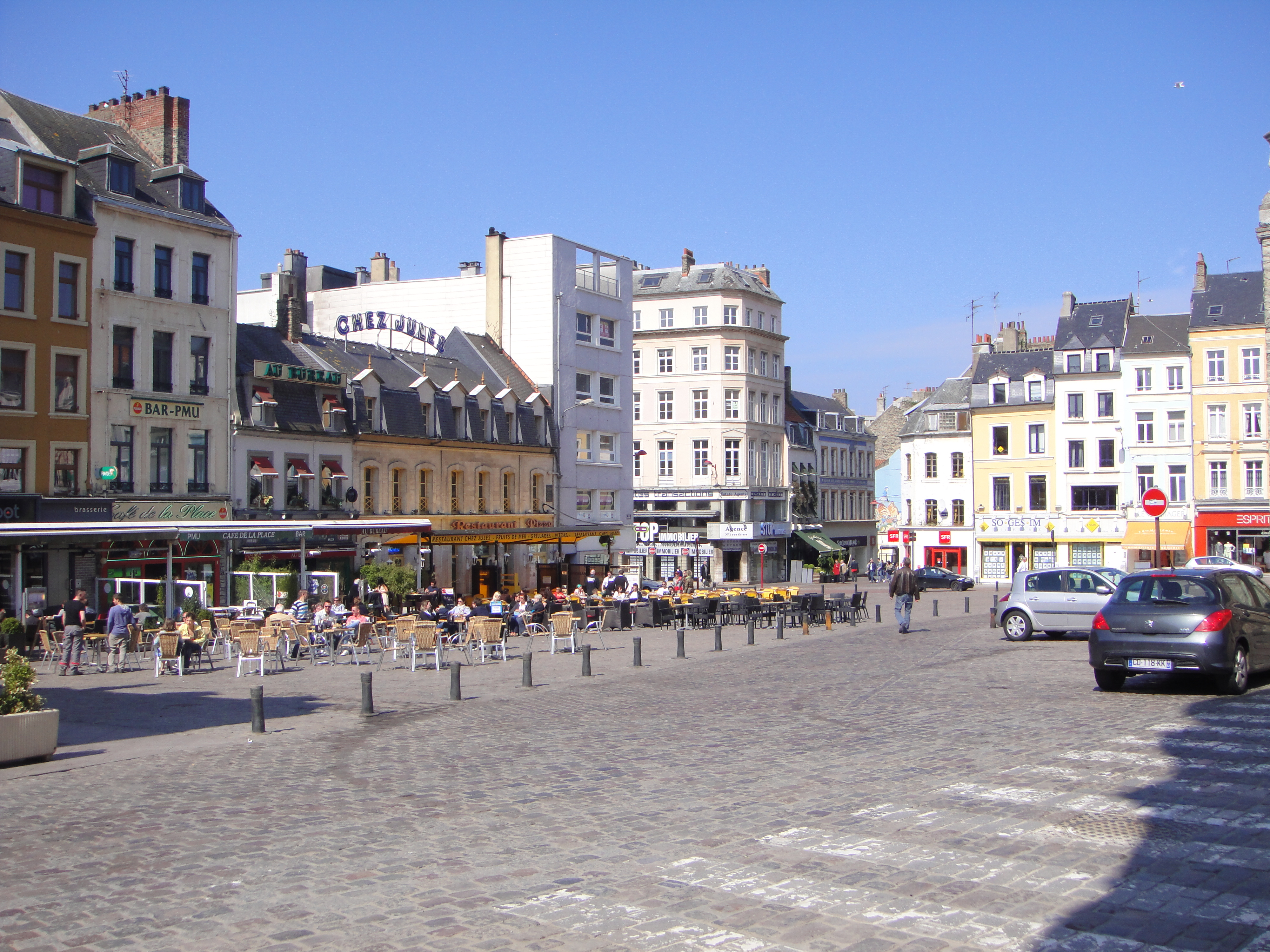 Place Dalton - Boulogne-sur-Mer Photo prise par Bateloupreaut le 25 avril 2013